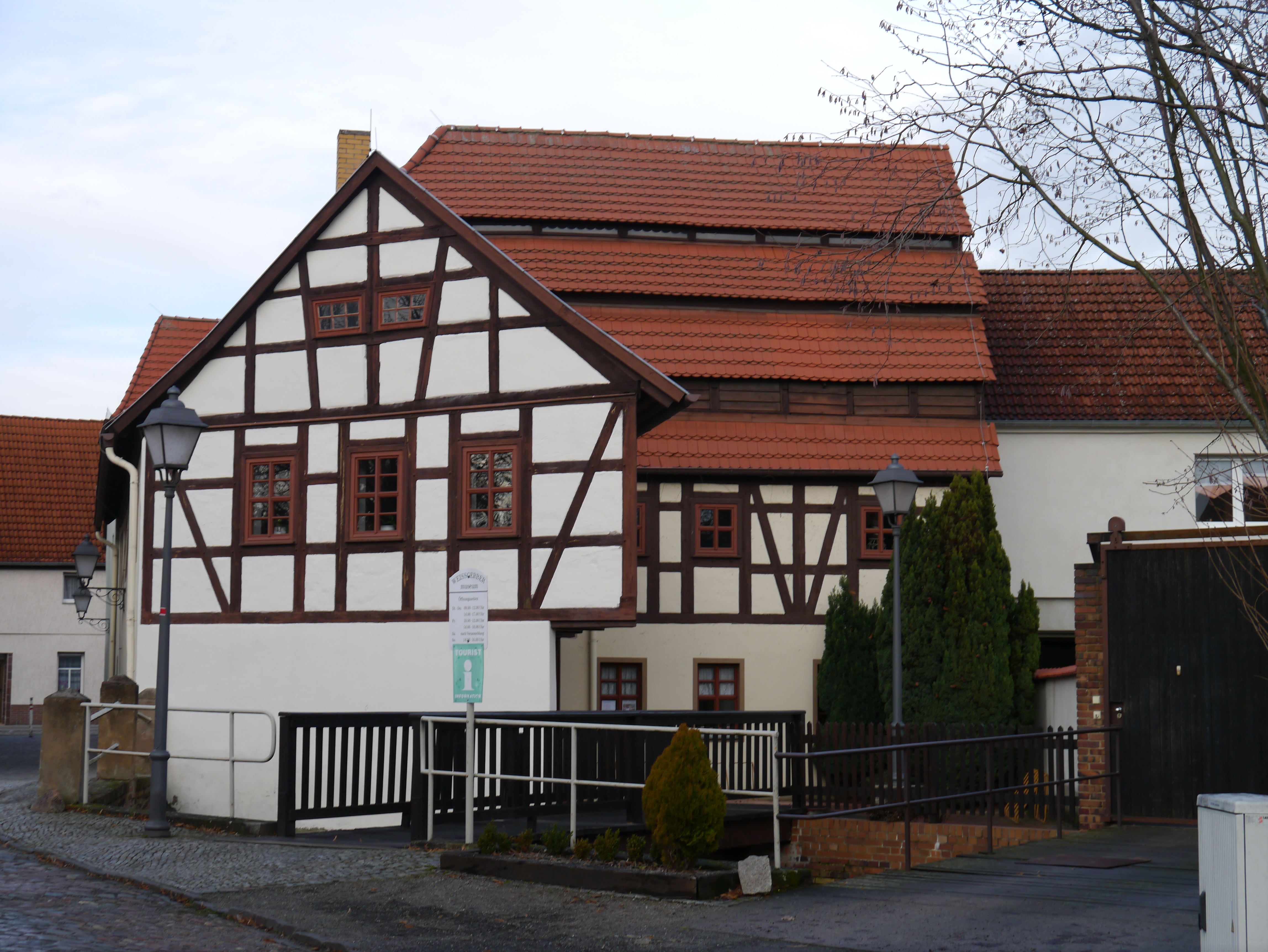 Weißgerbermuseum in Doberlug-Kirchhain (OT Kirchhain), Baudenkmal.